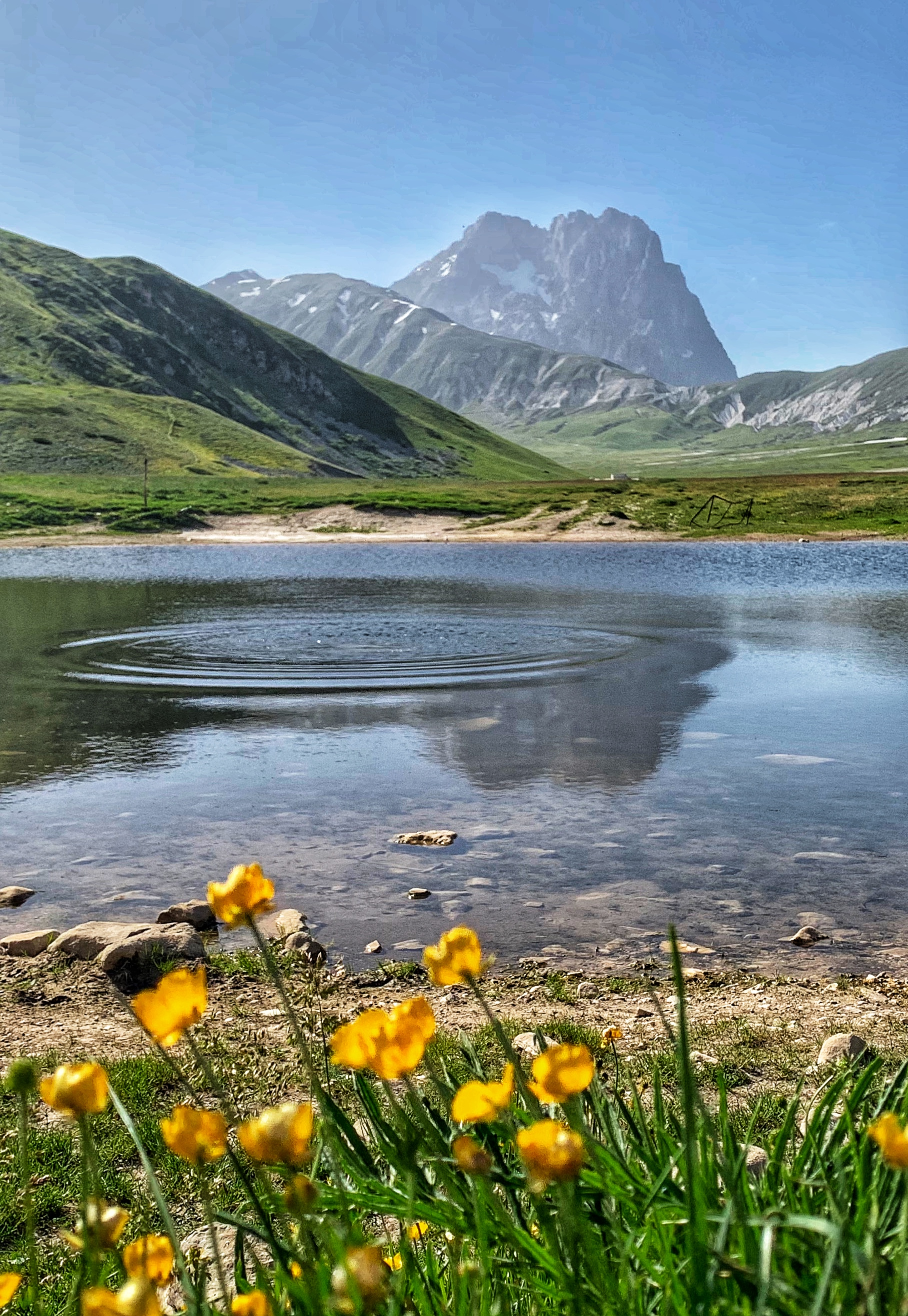 parco nazionale del Gran Sasso e Monti della Laga (Q1027914)